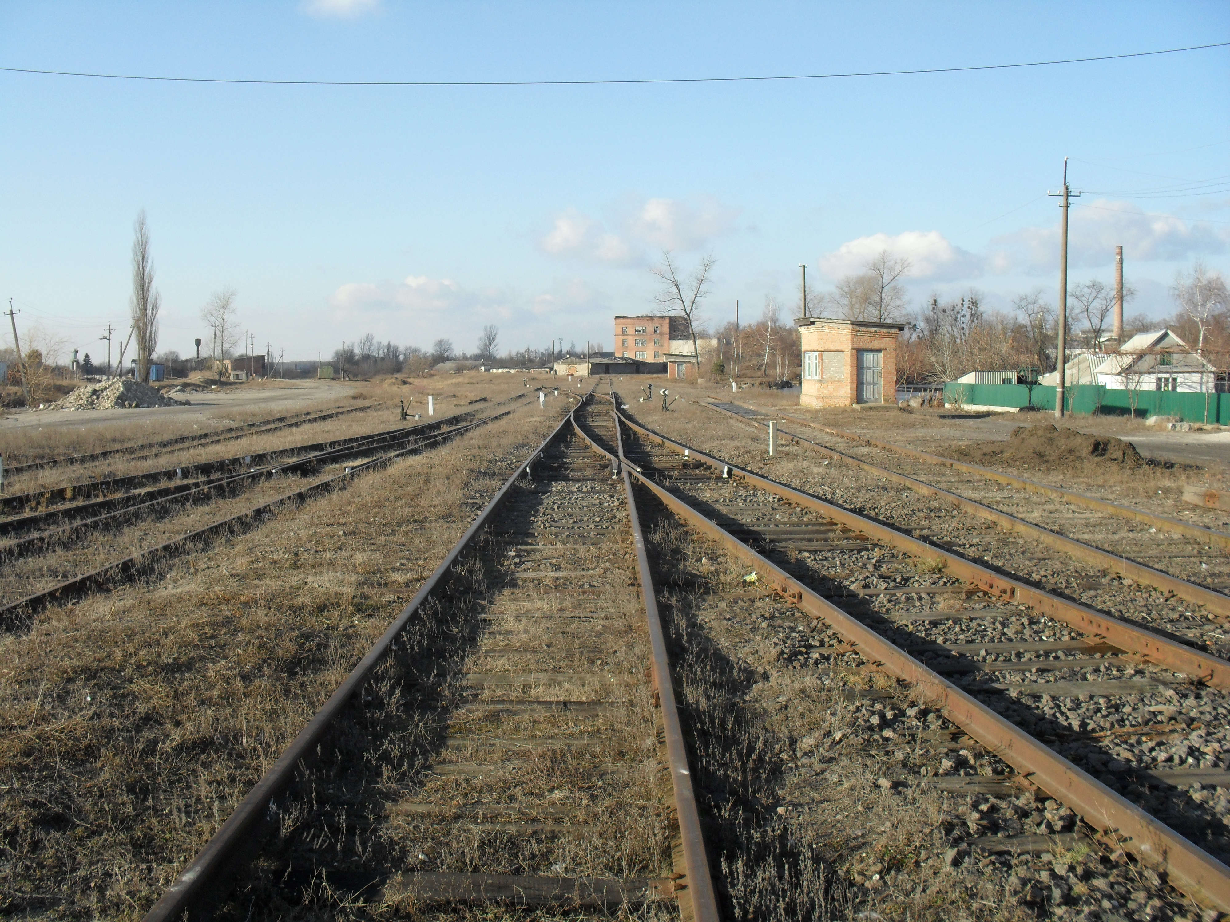 Залізнична станція Турбів